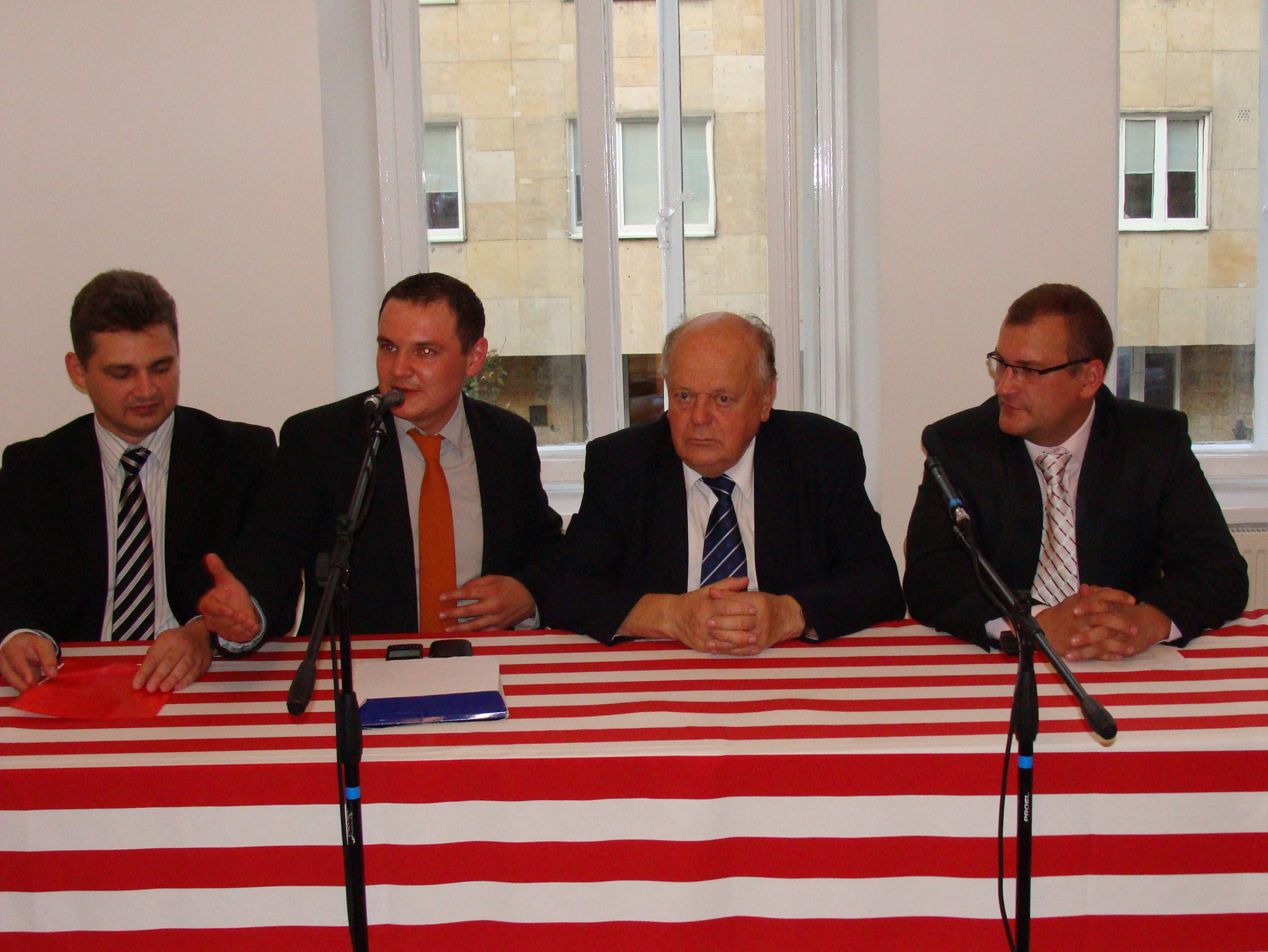 Juryj Hubarewicz, Alaksandr Zarembiuk, Stanisłau Szuszkiewicz i Dzmitryj Barodka na otwarciu Białoruskiego Domu w Warszawie na ul. Wiejskiej 13/3